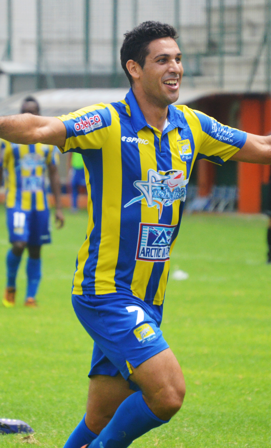 Francisco García Britez en Delfín Sporting Club de Ecuador en 2014